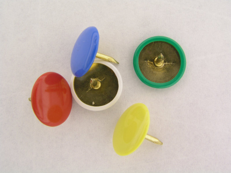 Eigen foto e van herk 2004